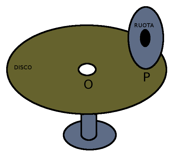 Analizzatore differenziale di Kelvin